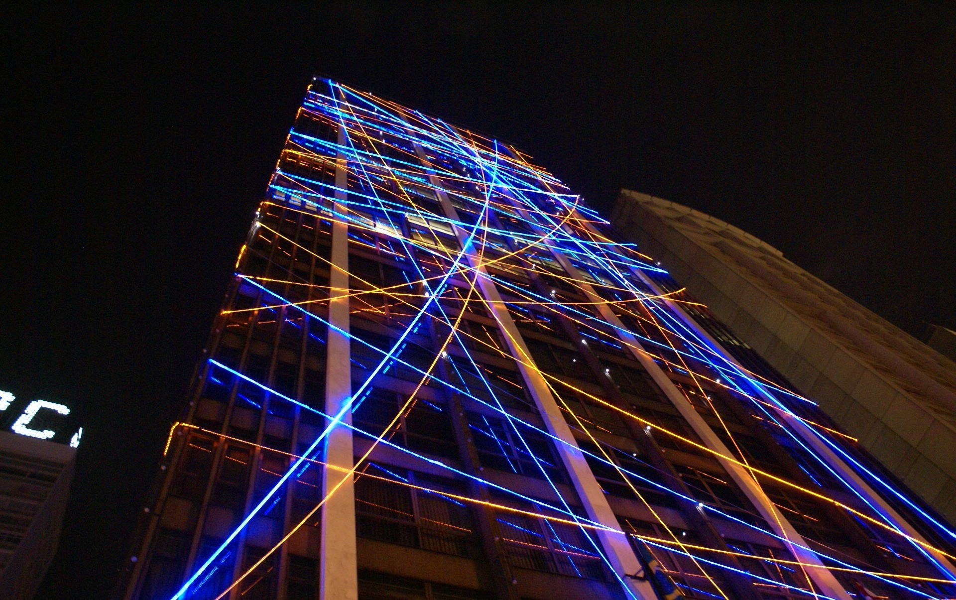 Banco do Brasil no Natal de 2009 na Avenida Paulista, em São Paulo - Bank of Brazil in Christmas 2009, Paulista Avenue in São Paulo City.